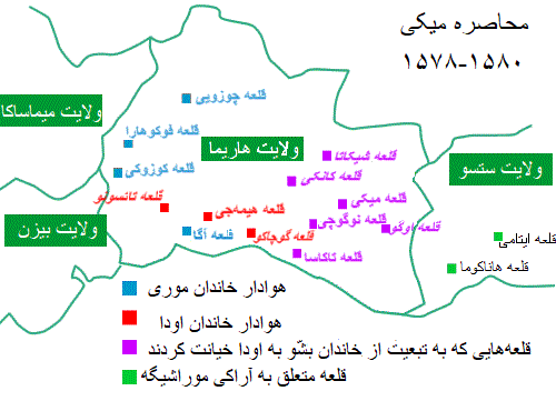 نقشه محاصره قلعه میکی در سال 1580